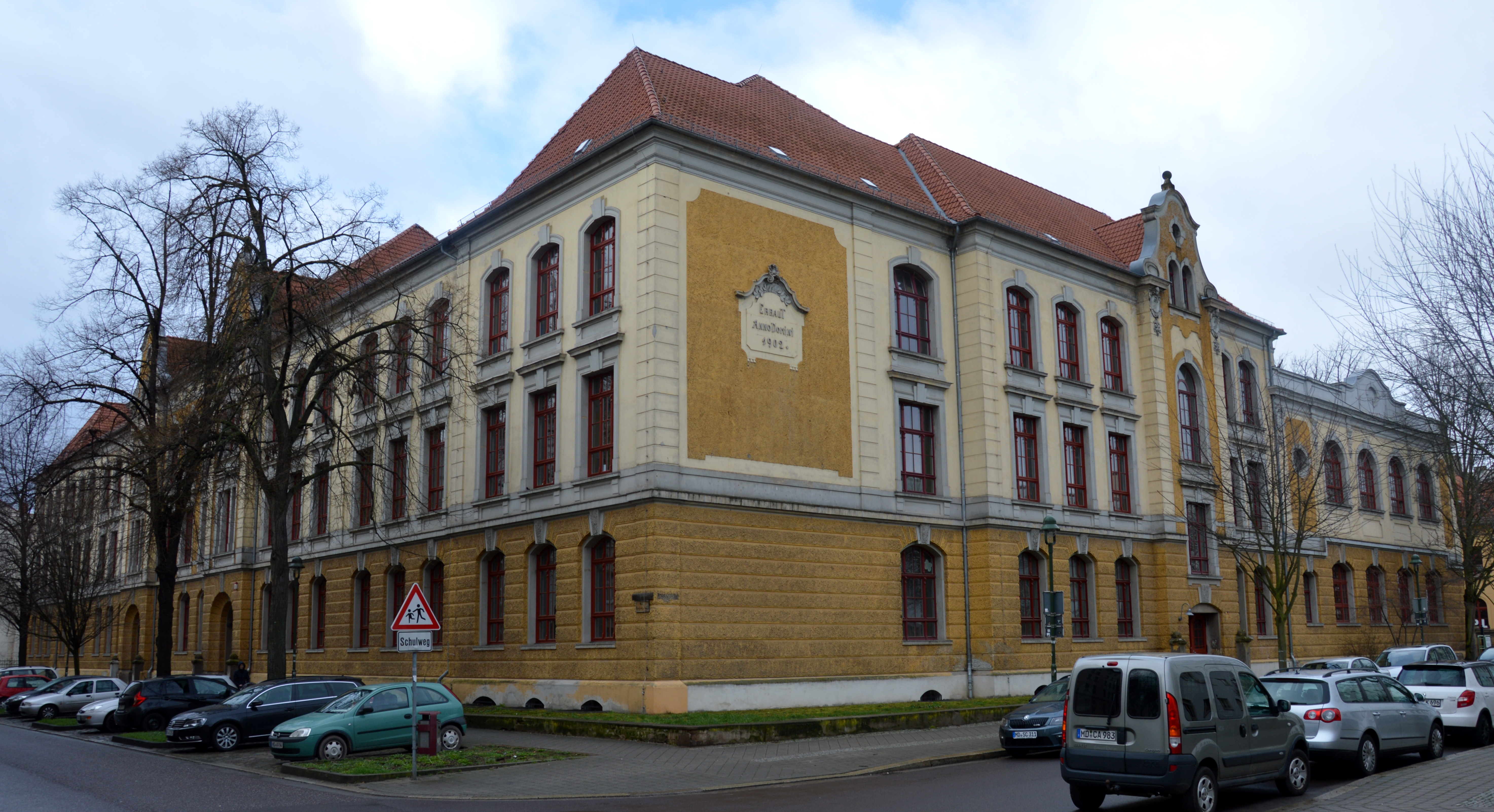 Schule in der Amsdorfstraße